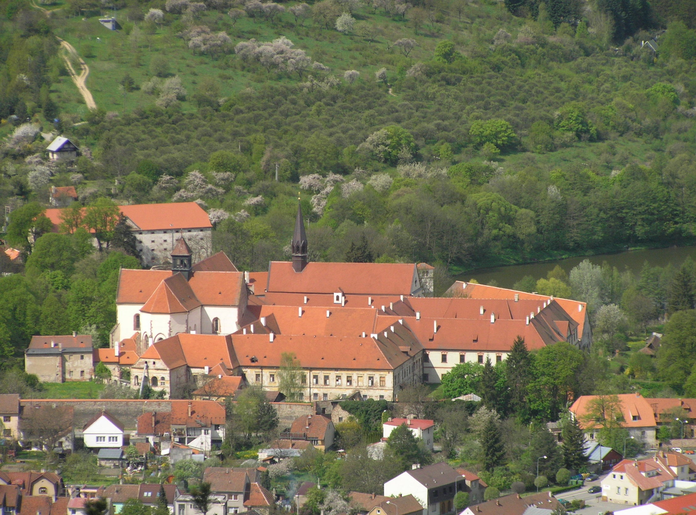 Klášter Porta Coeli v obci Předklášteří u Tišnova